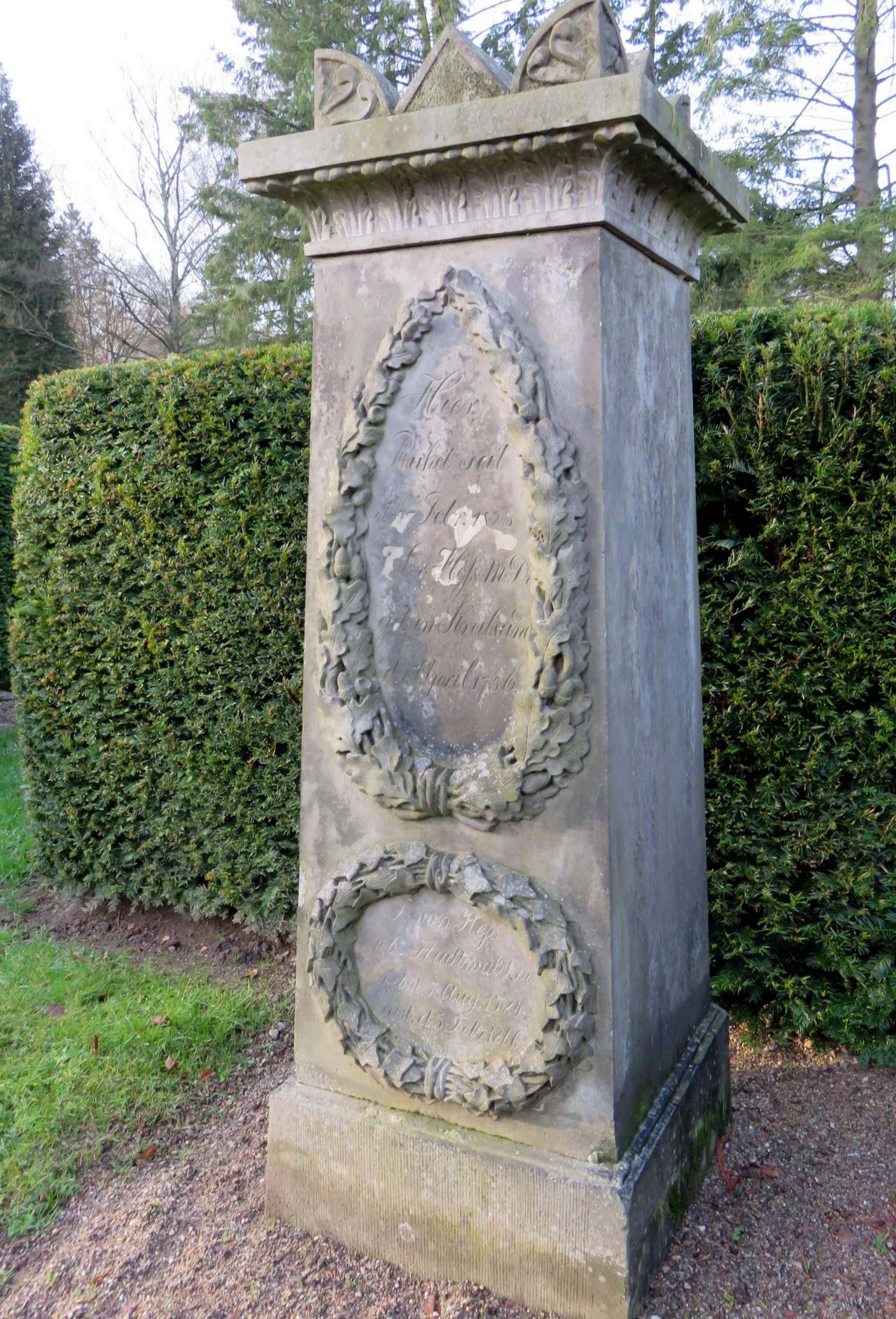 Grabmal für Jonas Ludwig von Heß (1756 -1823) im Grabmal-Freilichtmuseum Heckengarten auf dem Hamburger Friedhof Ohlsdorf. Details und Inschrift bei Eberhard Kändler: Begräbnishain und Gruft. Die Grabmale der Oberschicht auf den alten Hamburger Friedhöfen. Christians Verlag, Hamburg 1997, ISBN 3-7672-1294-3, S. 119. Inschrift ebenfalls bei .